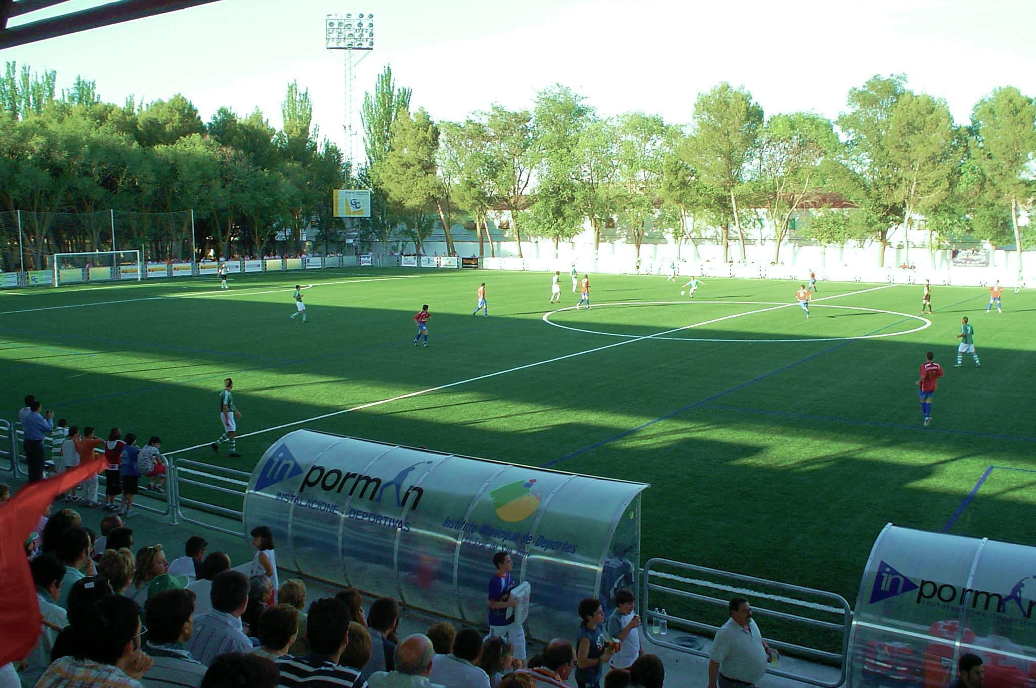 Estadio Municipal de Alcázar de San Juan, durante un partido de fútbol entre el Club de Fútbol Gimnástico de Alcázar y el Villanovense Ofigevi.